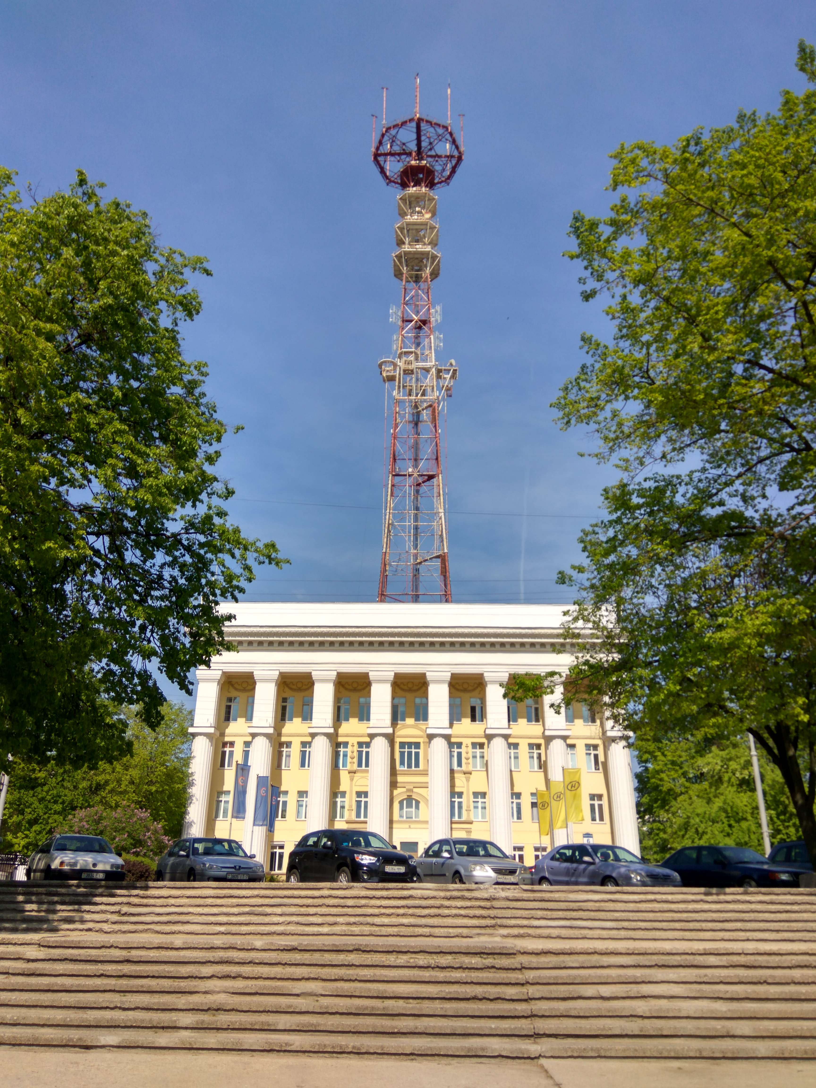 Мінск. Вуліца Камуністычная. Тэлецэнтр